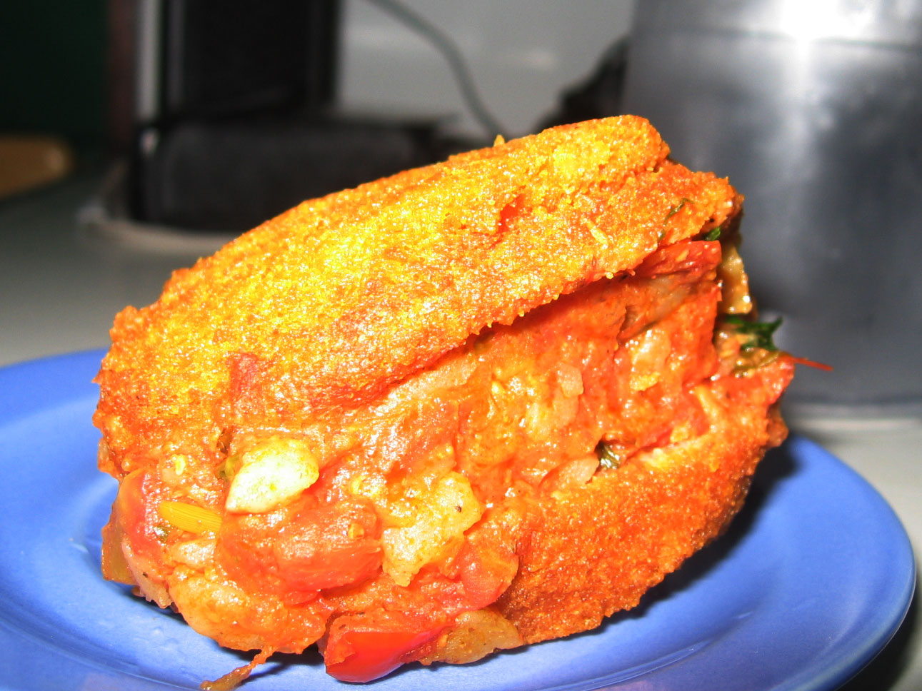 (Portuguese) Akara, iguaria do candomblé e da culinária baiana